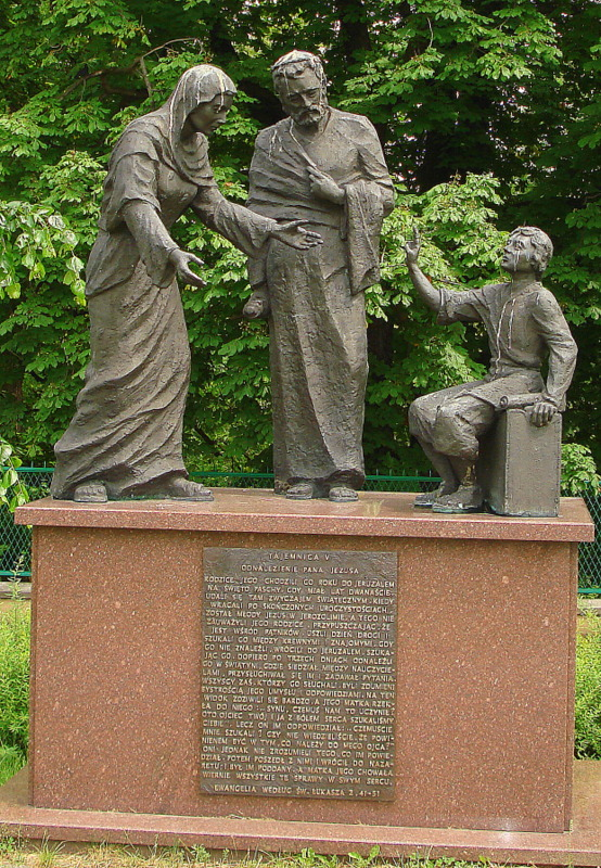 Częstochowa, zespół klasztorny paulinów na Jasnej Górze